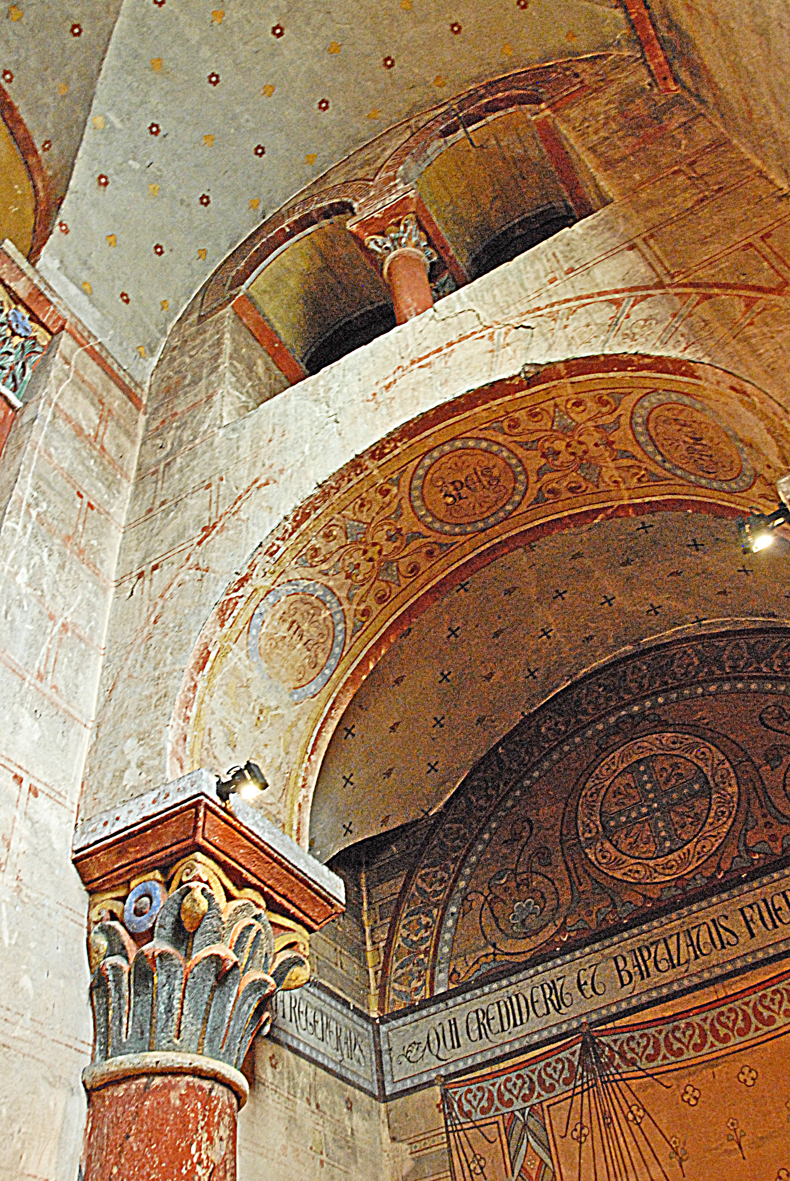 nördl. Seitenschiff, Narthexwand